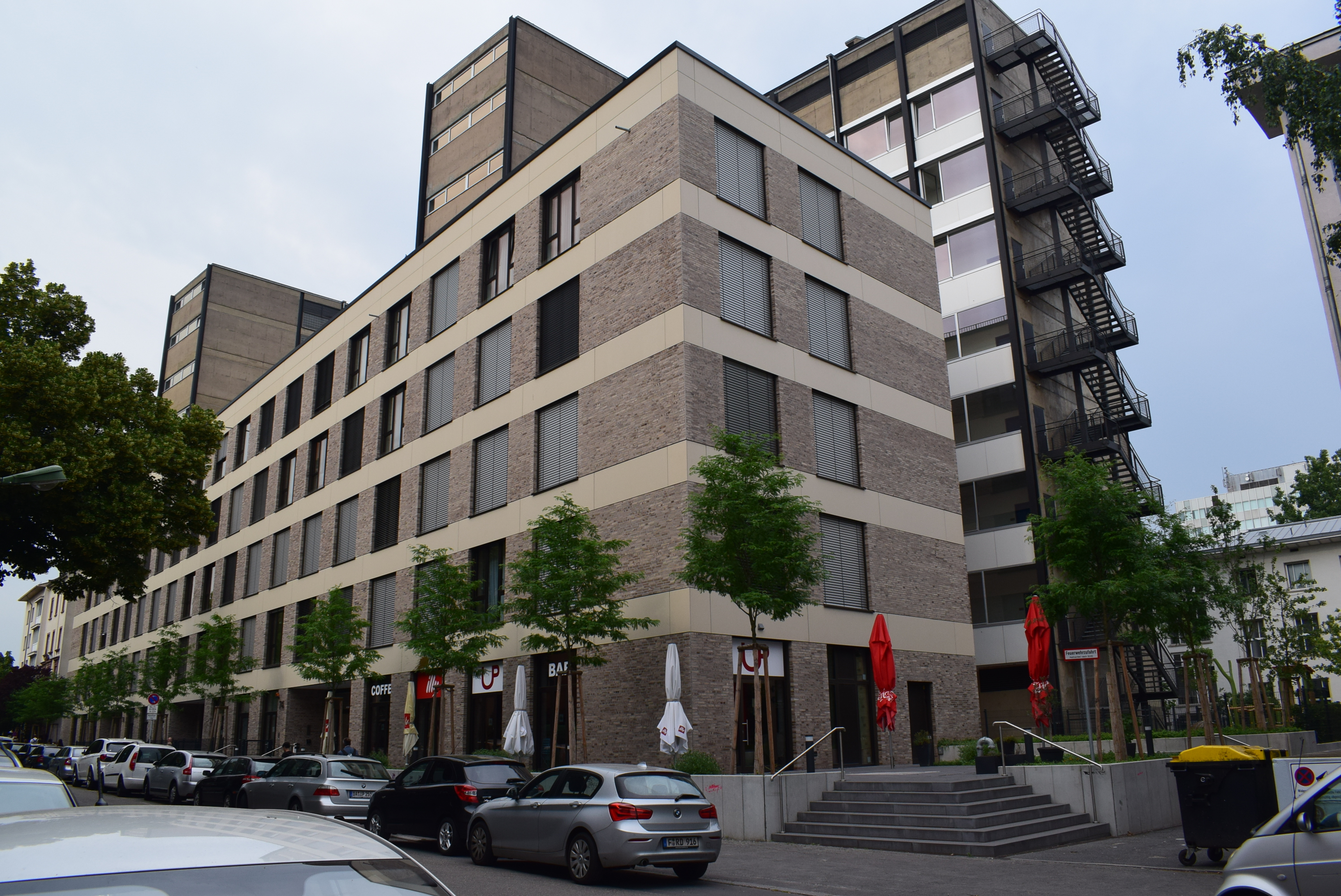 Frankfurt Philosophicum